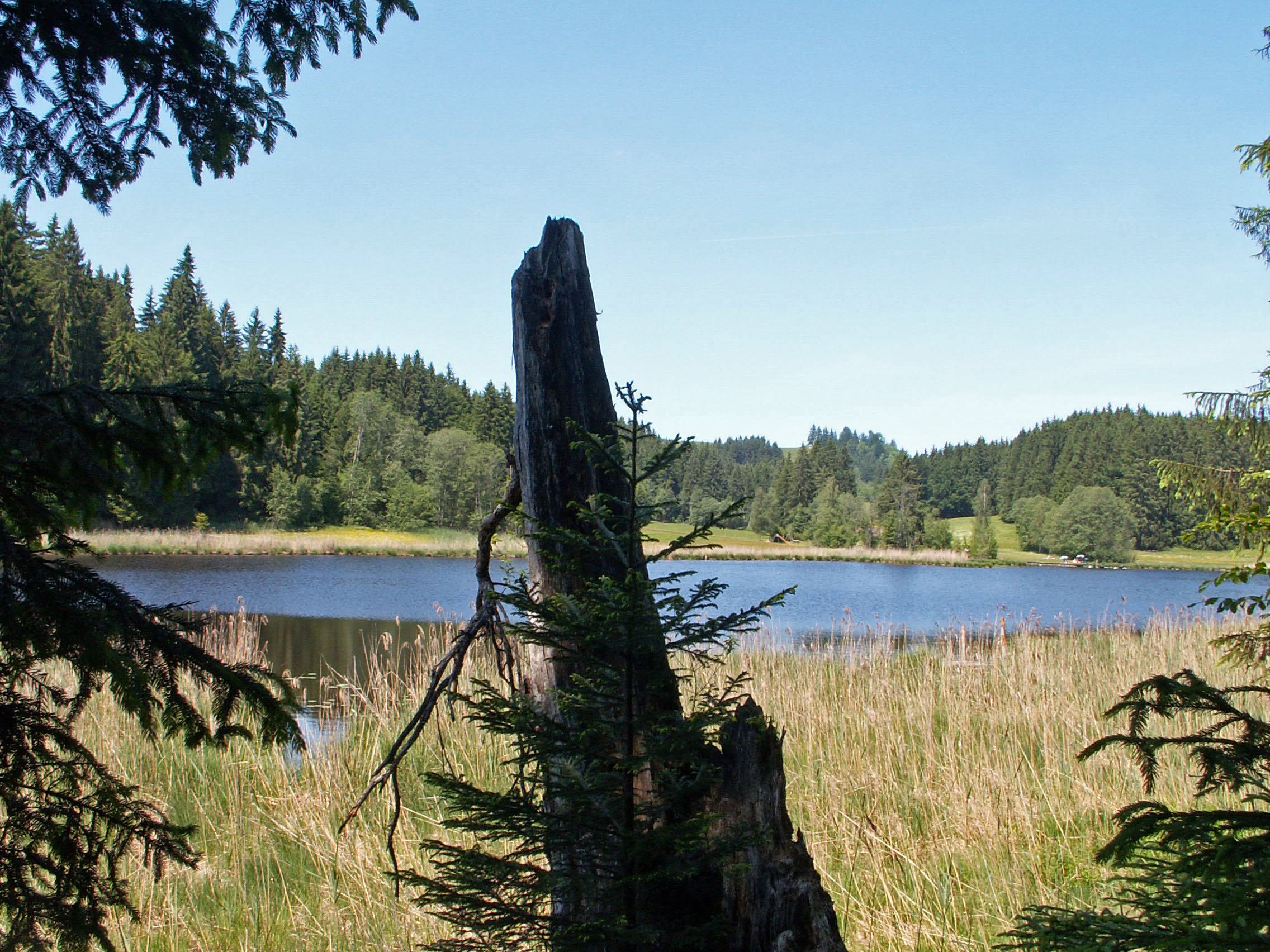 Faulensee, Rieden am Forggensee